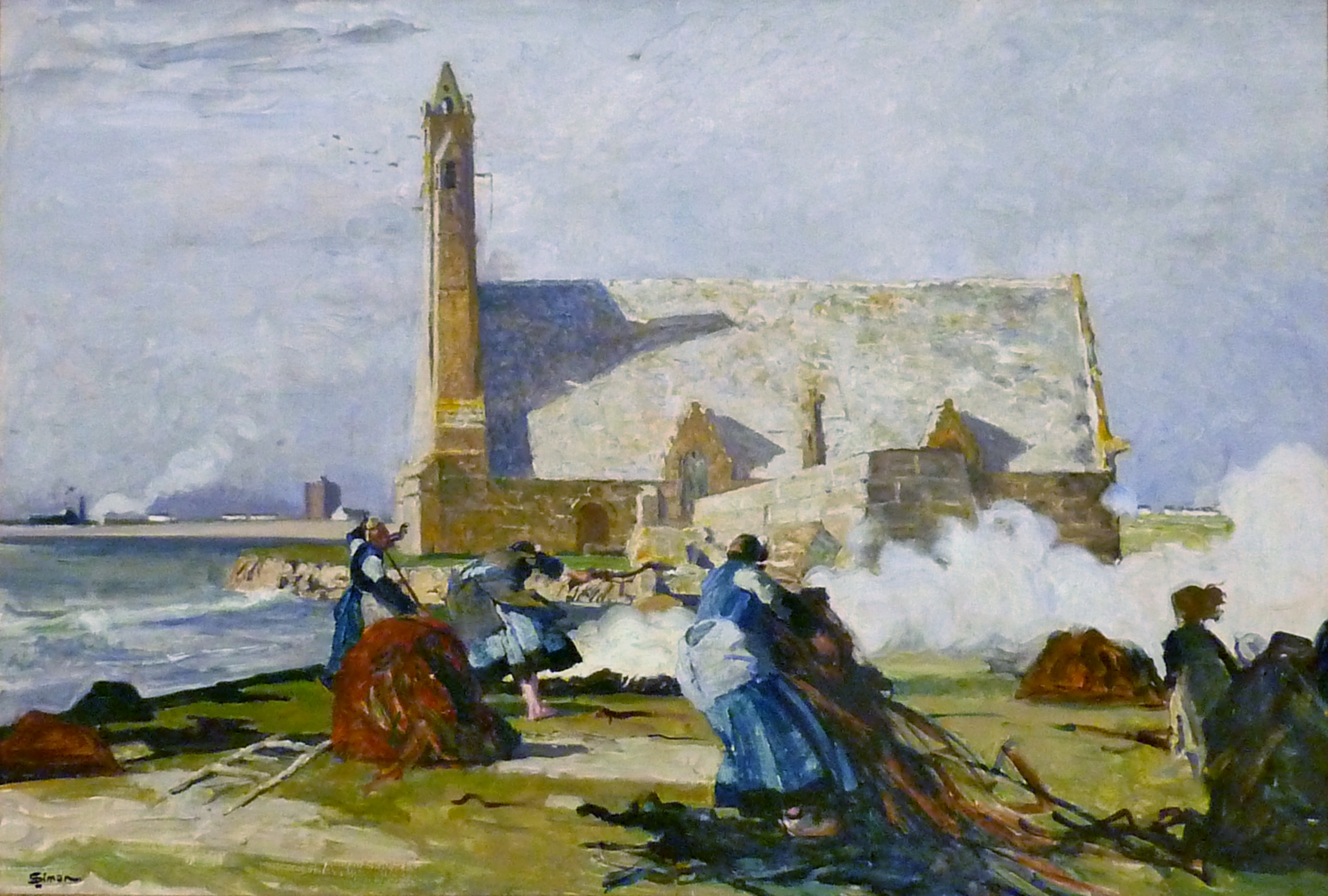 Ce tableau représente une scène de brûlage du goémon, afin d'obtenir la soude, devant la chapelle.